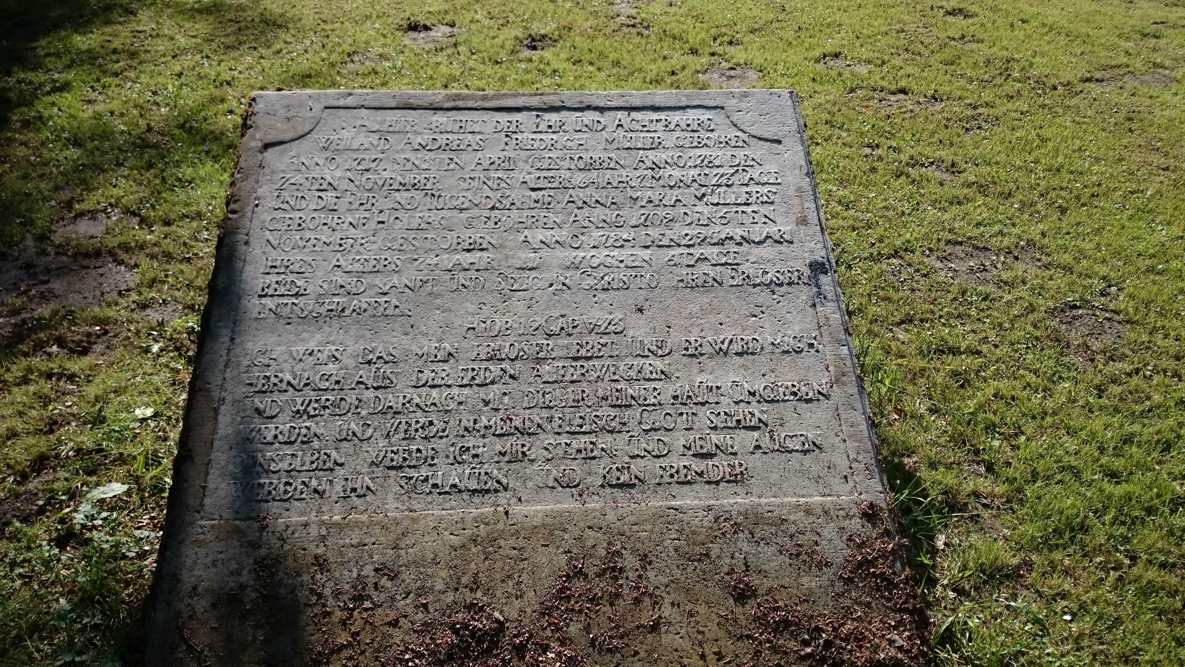 Grabstein des Andreas Friedrich Müller und der Anna Maria Müllers (gelistet auf der Liste der Baudenkmale in Neuenkirchen)